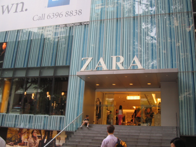 A Zara store in Singapore.